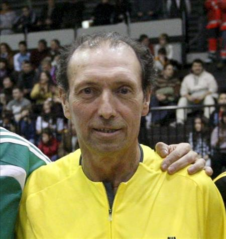 Enrique Castro Quini